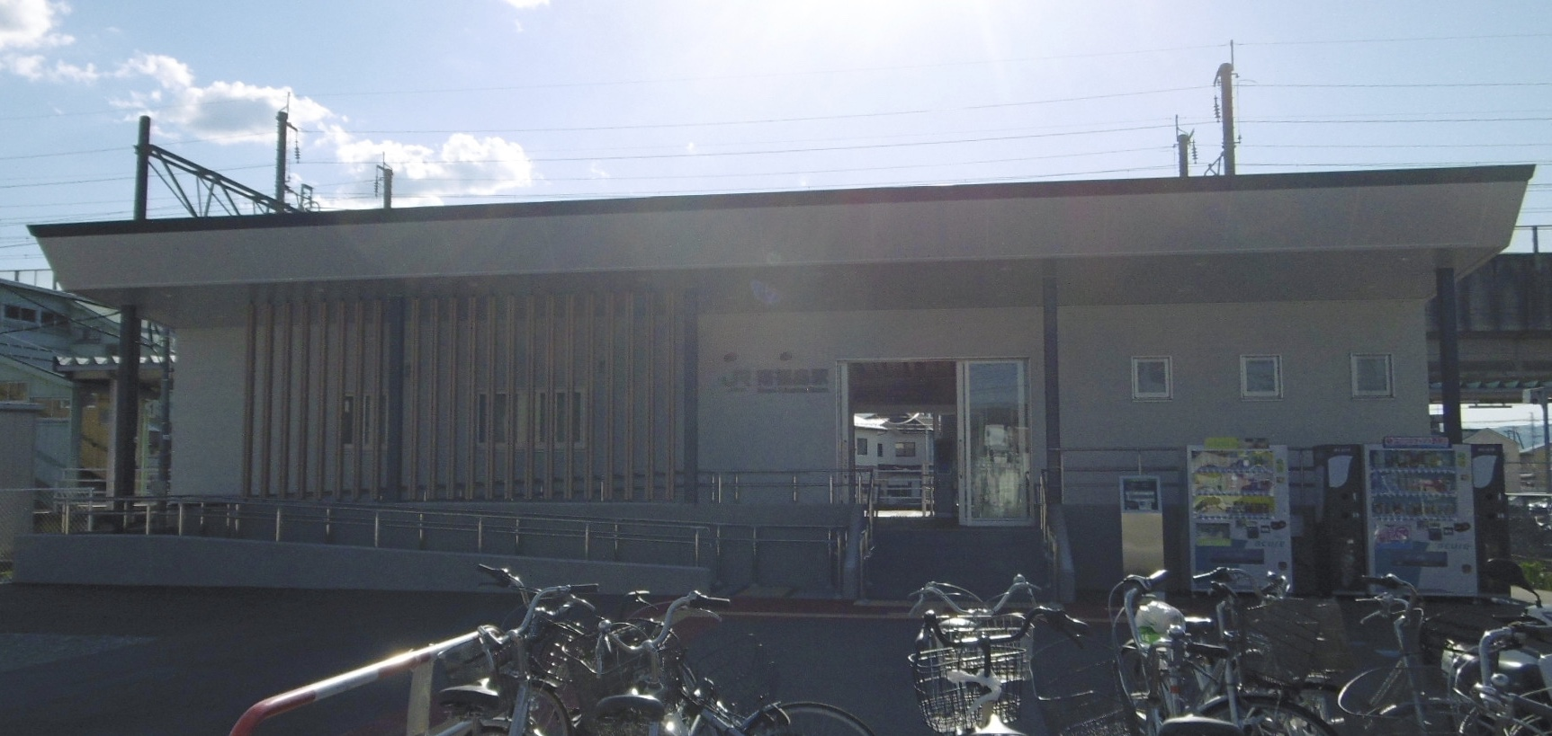 JR東日本東北本線南福島駅の新駅舎